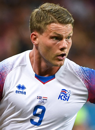 Сборная Исландии уступает Хорватии и покидает ЧМ-2018